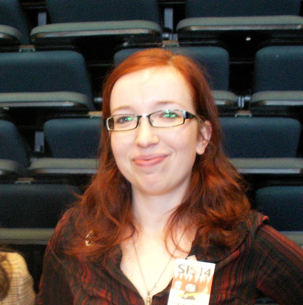 Tinet Elmgren, på SIS 2014.